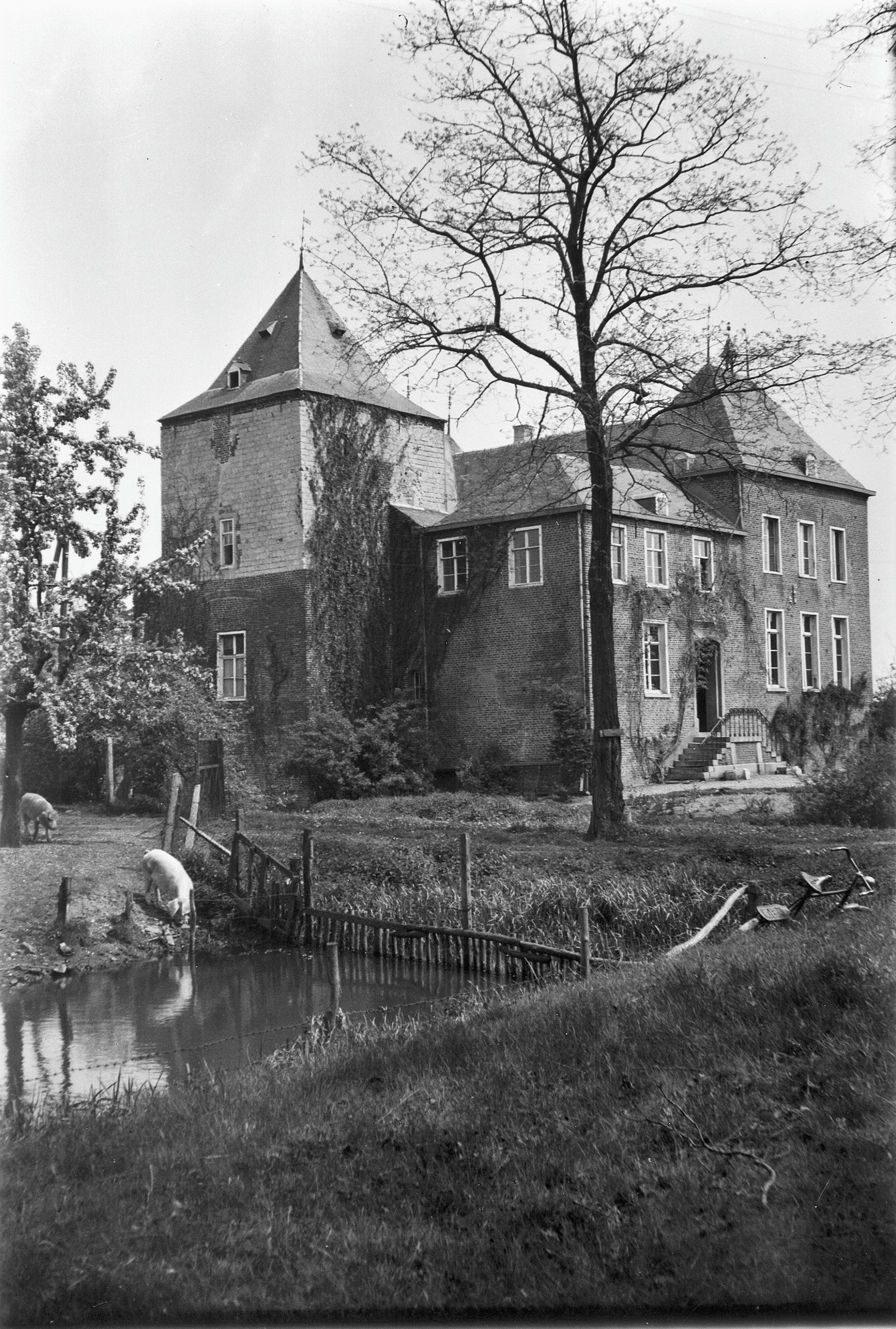 Kasteel: aanzicht